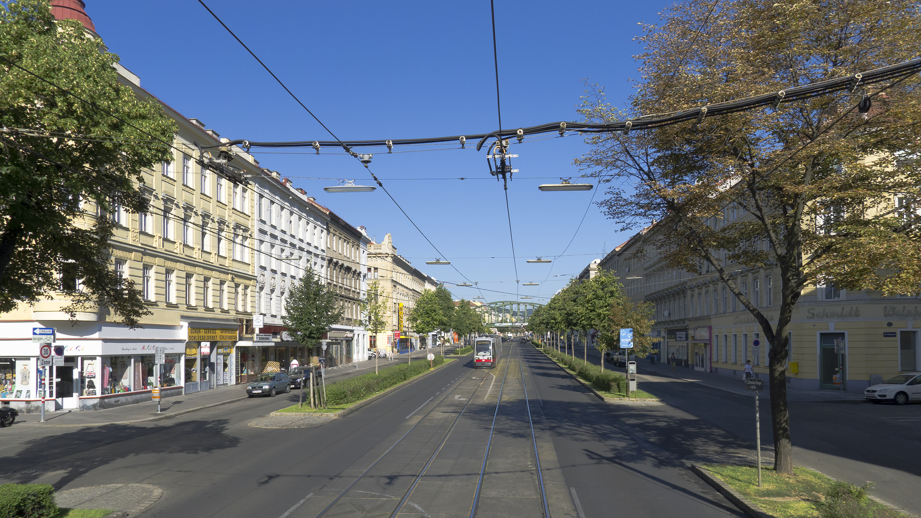 Hernalser Hauptstraße in Wien 17 bei der Lienfeldergasse Richtung Westen